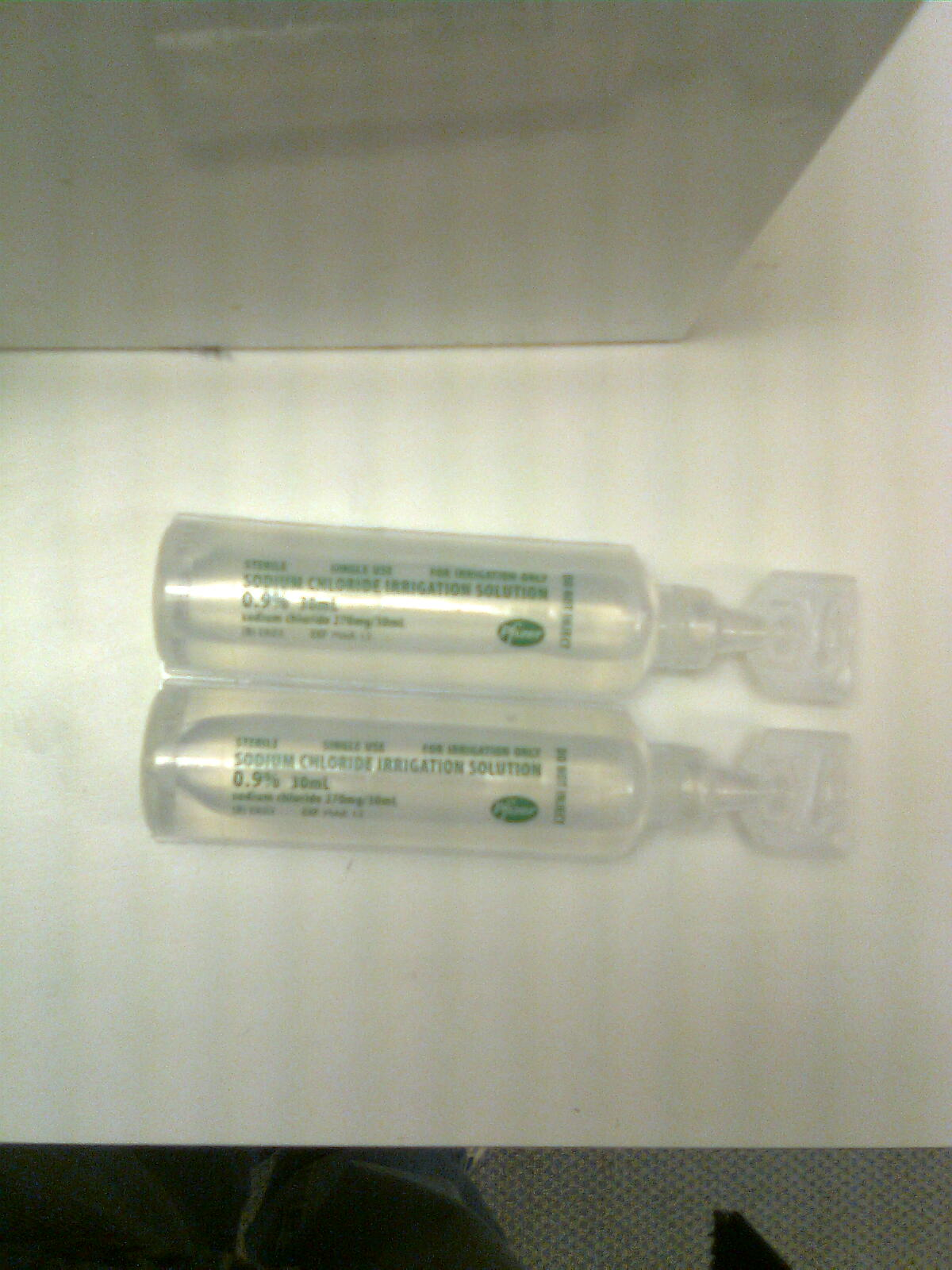 प्रथमोपचार पेटी साहित्य सलाईन